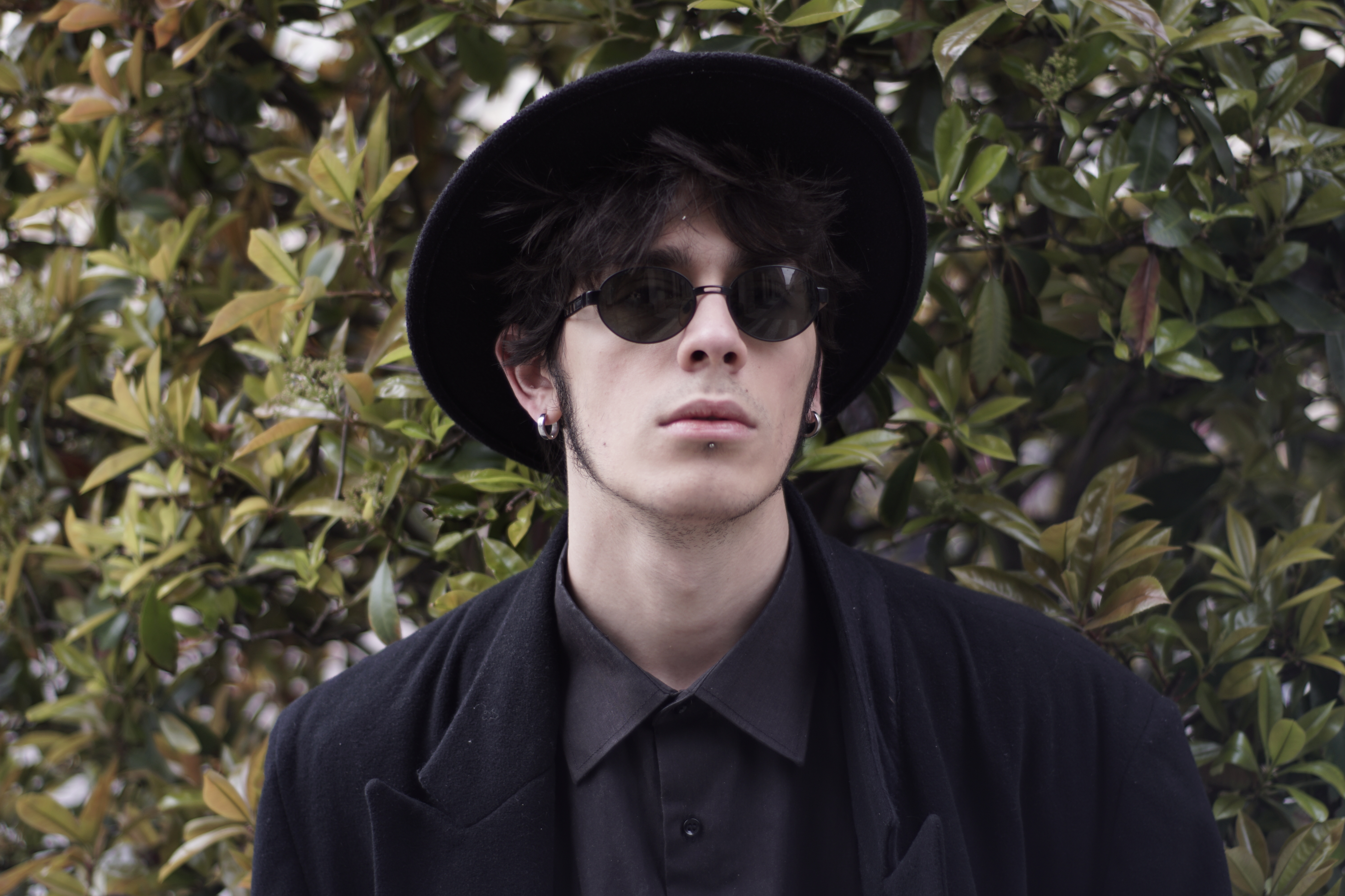 Riccardo Curci nel 2017.